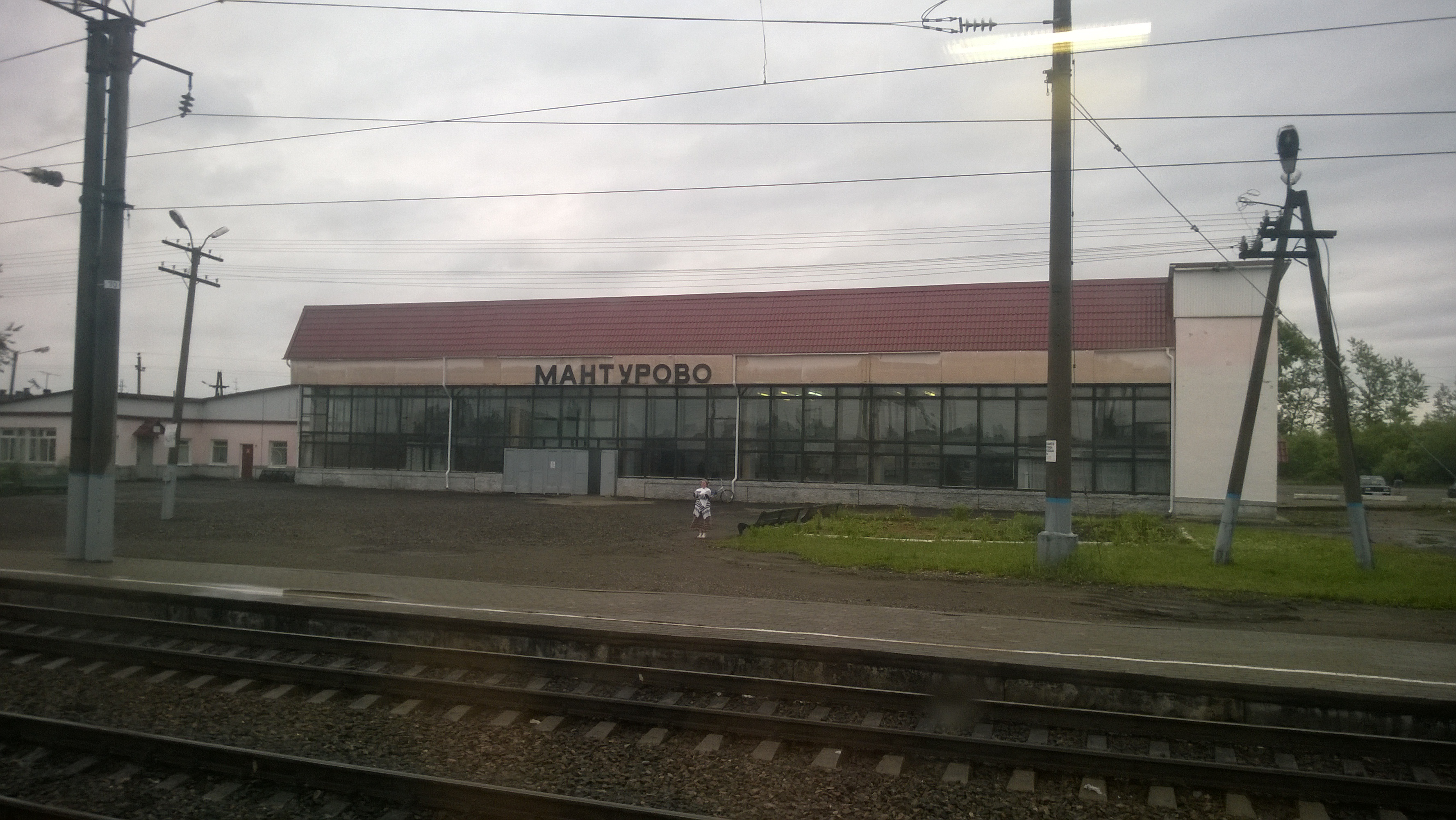 станция Мантурово